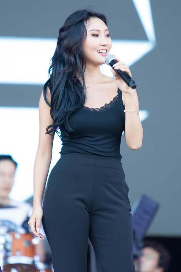 17.09.23 조이올팍페스티벌 - 마마무(MAMAMOO)